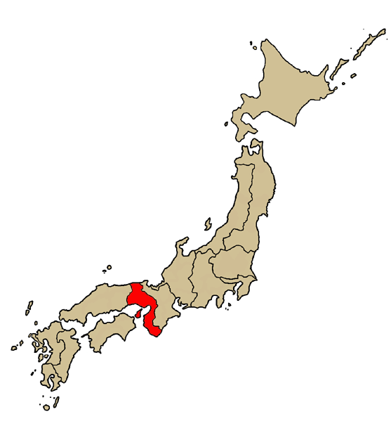 Mappa dell'arcidiocesi cattolica di Osaka, in Giappone. Lavoro personale.